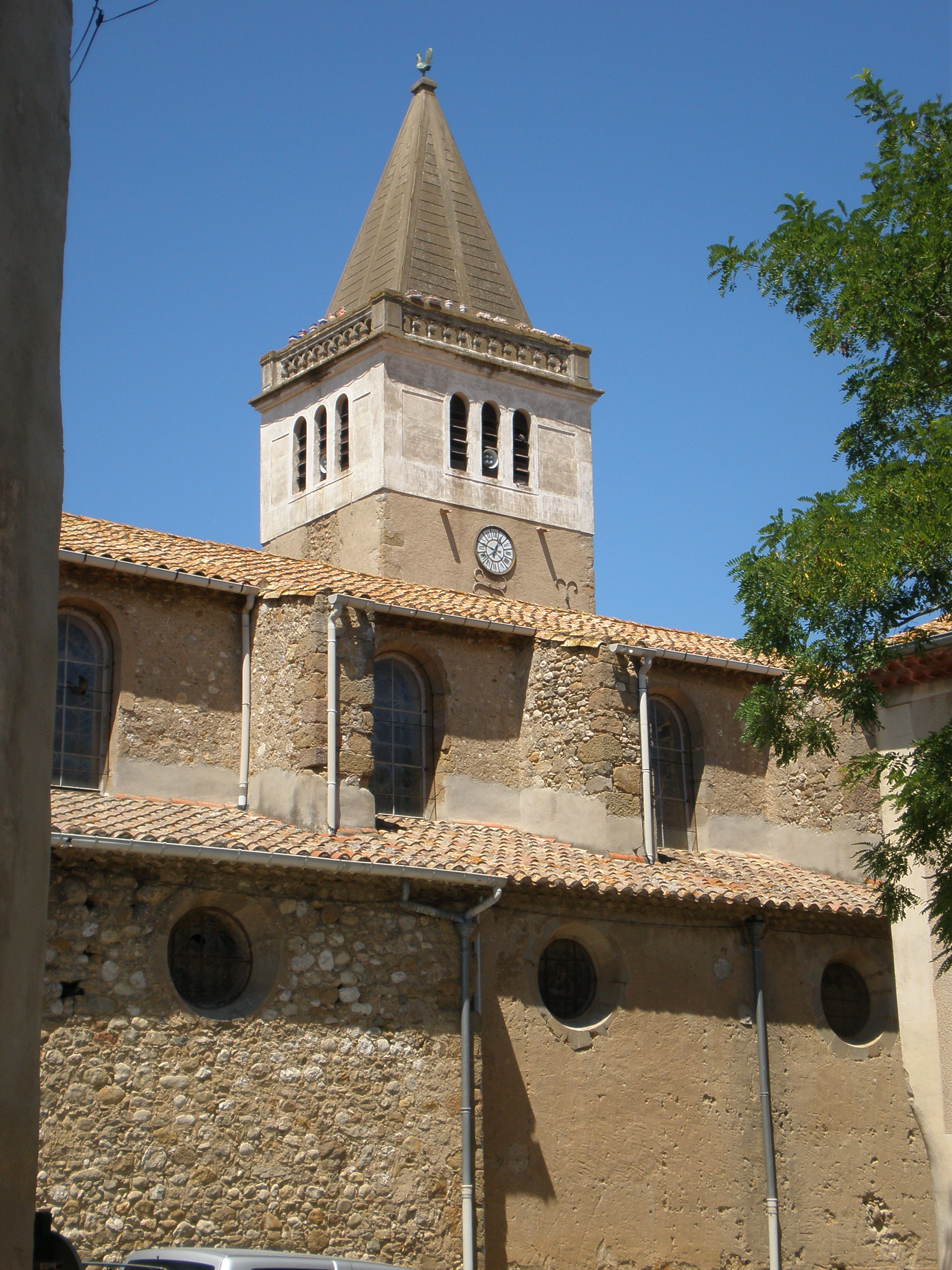 Église de Saint-Laurent-de-la-Cabrerisse